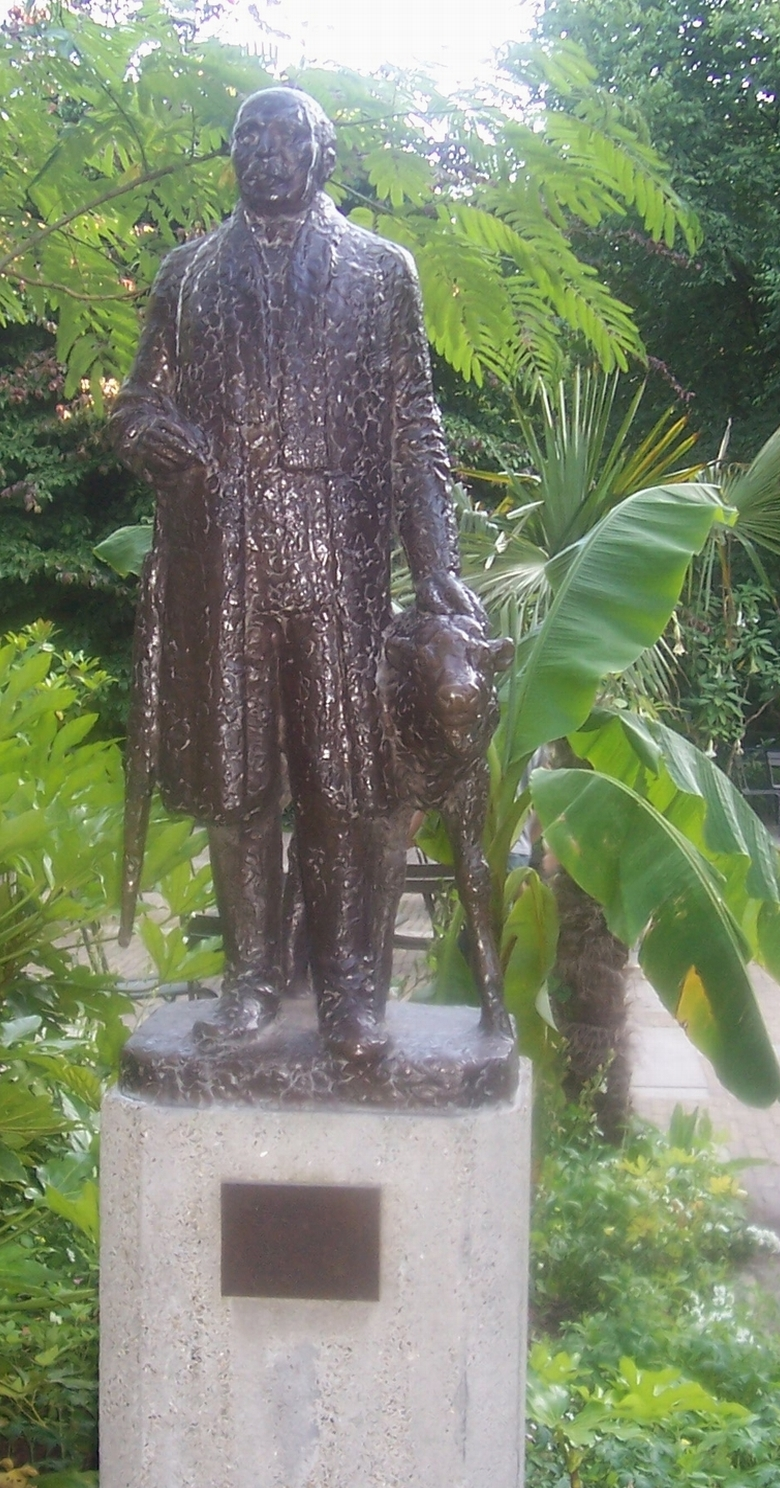 Voormalig directeur van Artis.